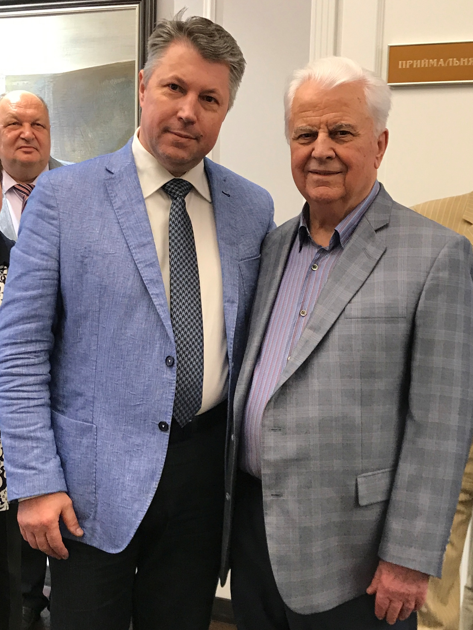 Первый президент Украины Л. М. Кравчук и врач С. В. Слесаренко